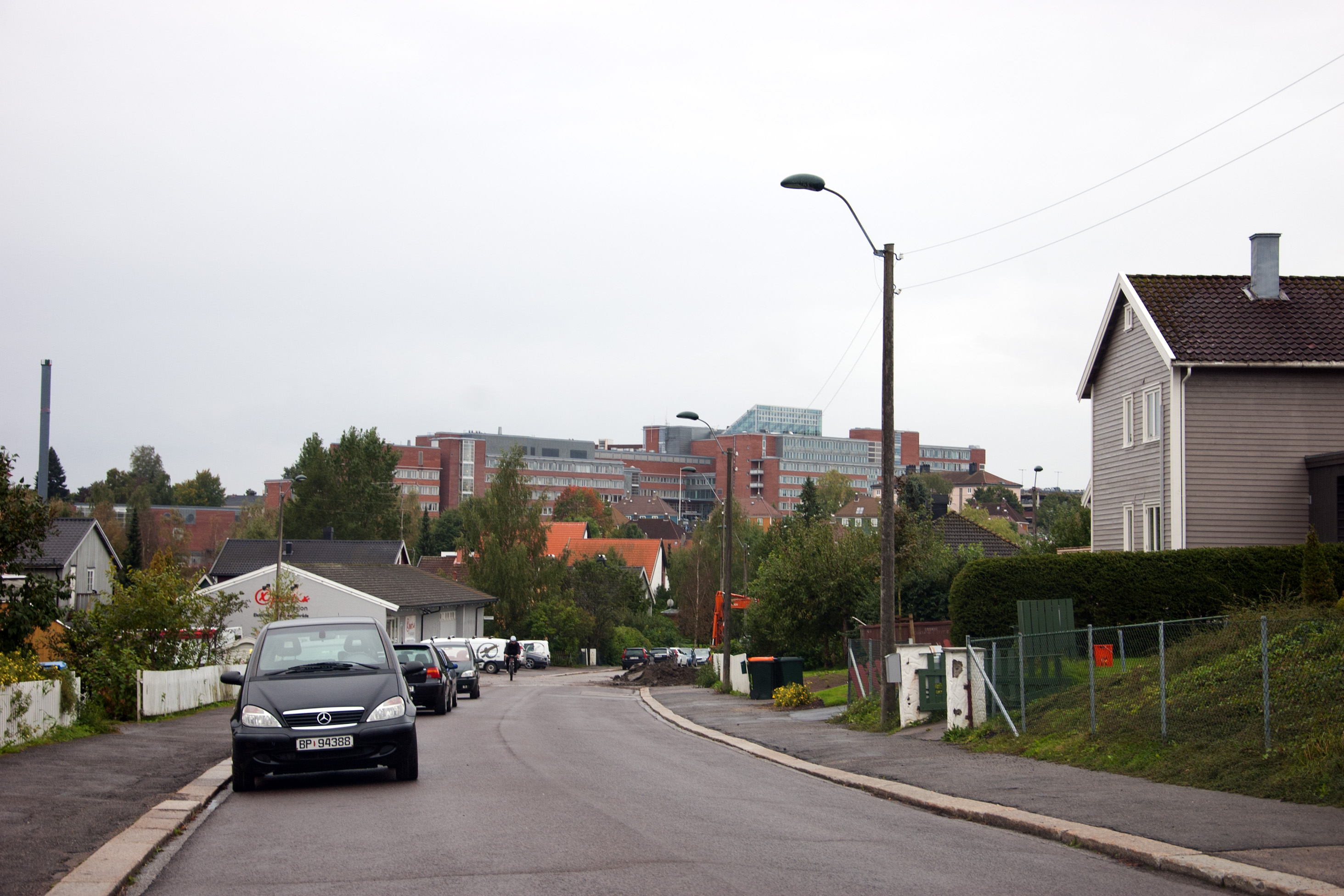 Fylkesvei 464 Wergelands vei i Tønsberg, Vestfold. I bakgrunnen: Sykehuset i Vestfold